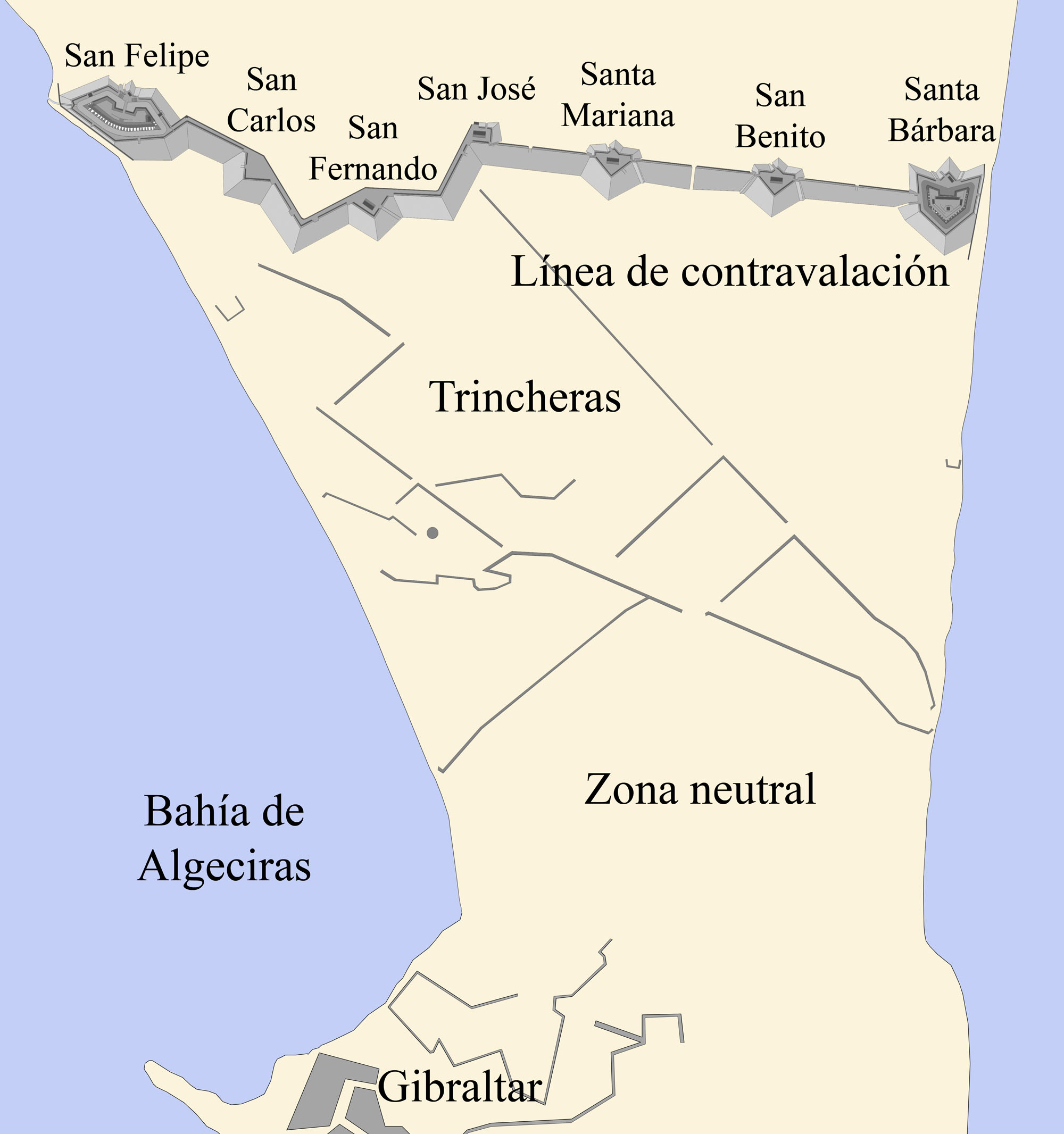 Línea de contravalación de Gibraltar en los tiempos del Gran Asedio, 1779